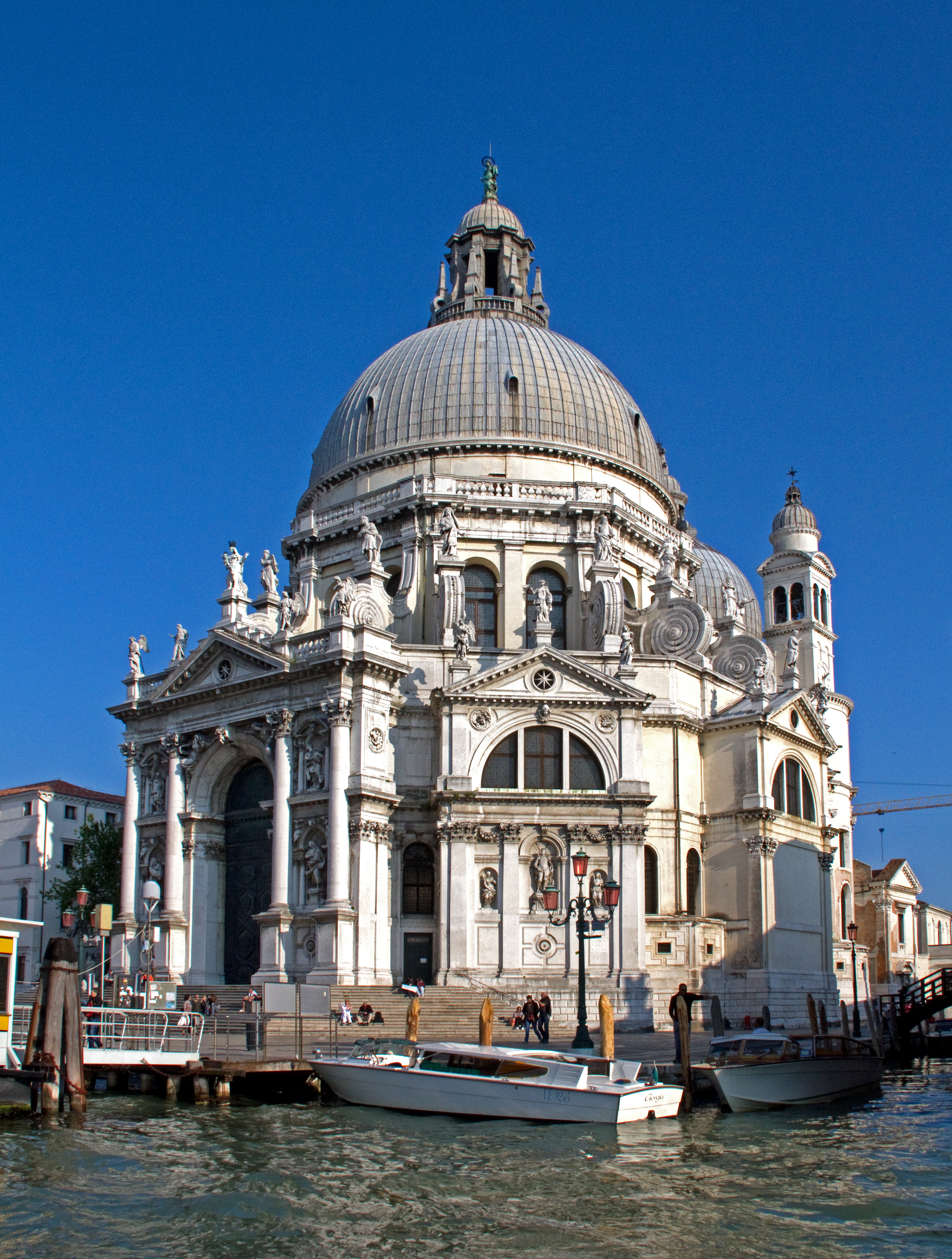 Salute 2